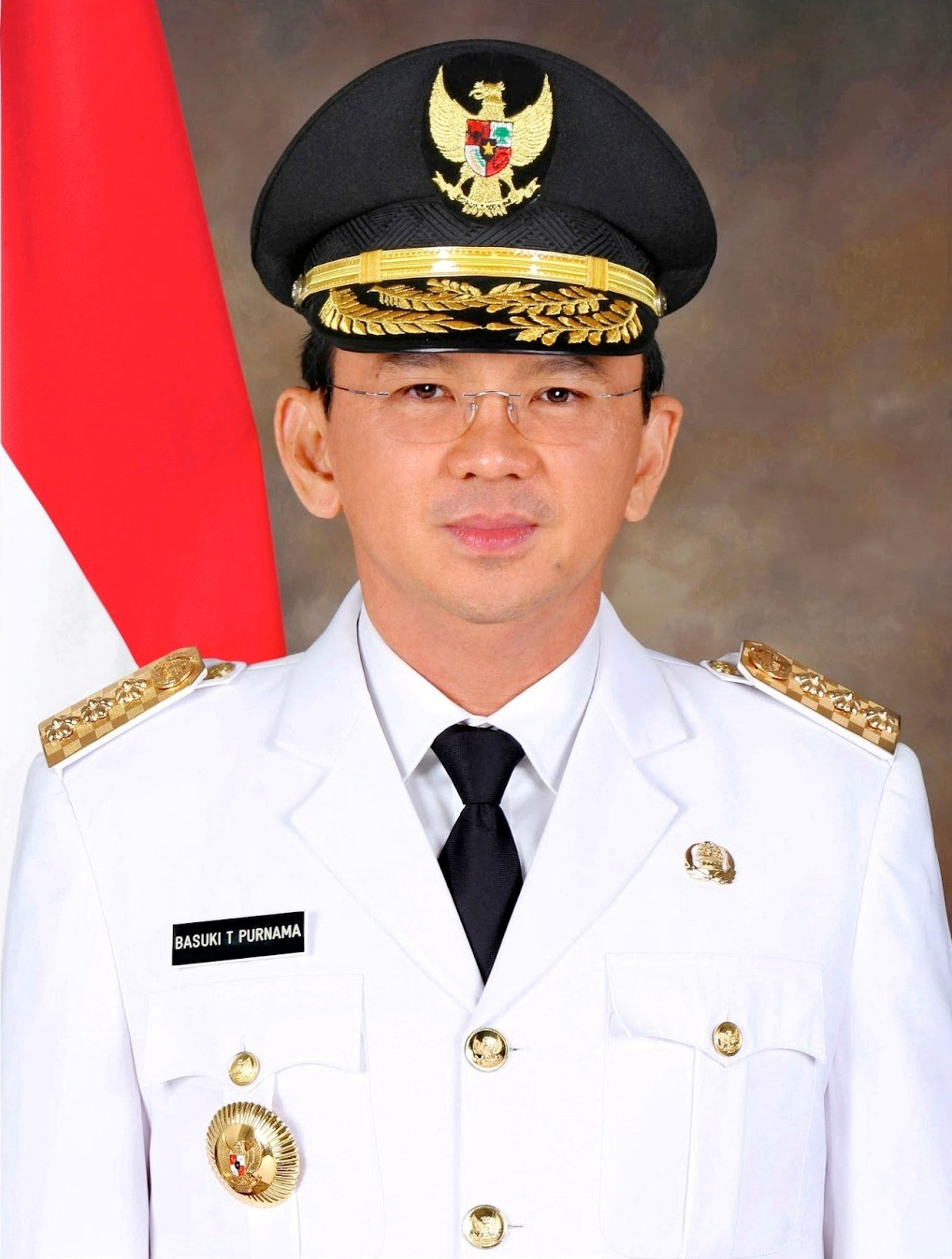 中文（台灣）: 鐘萬學